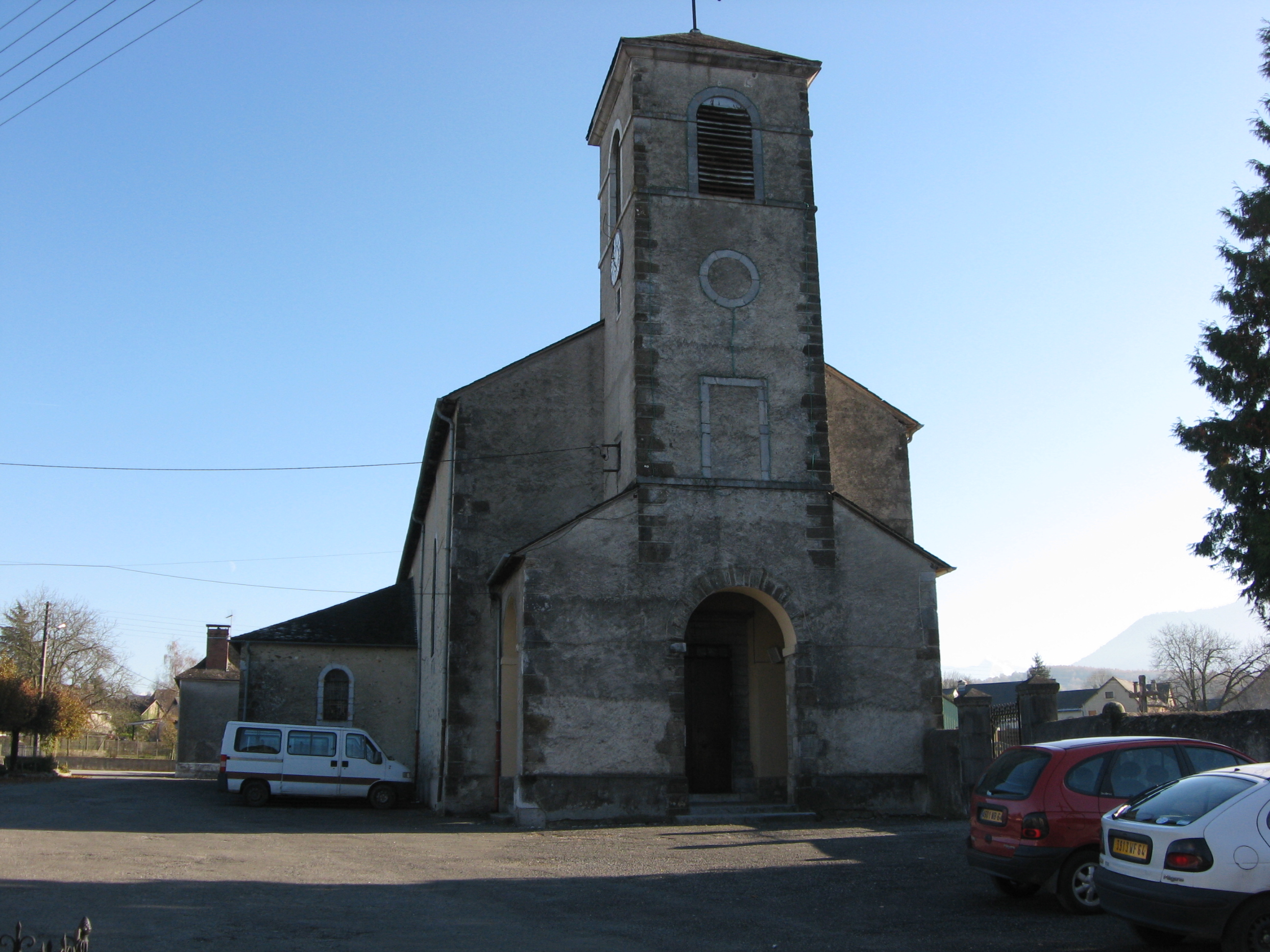 Eglise Saint Saturnin de Buzy (Pyrénées-Atlantiques) (Pyrénées).